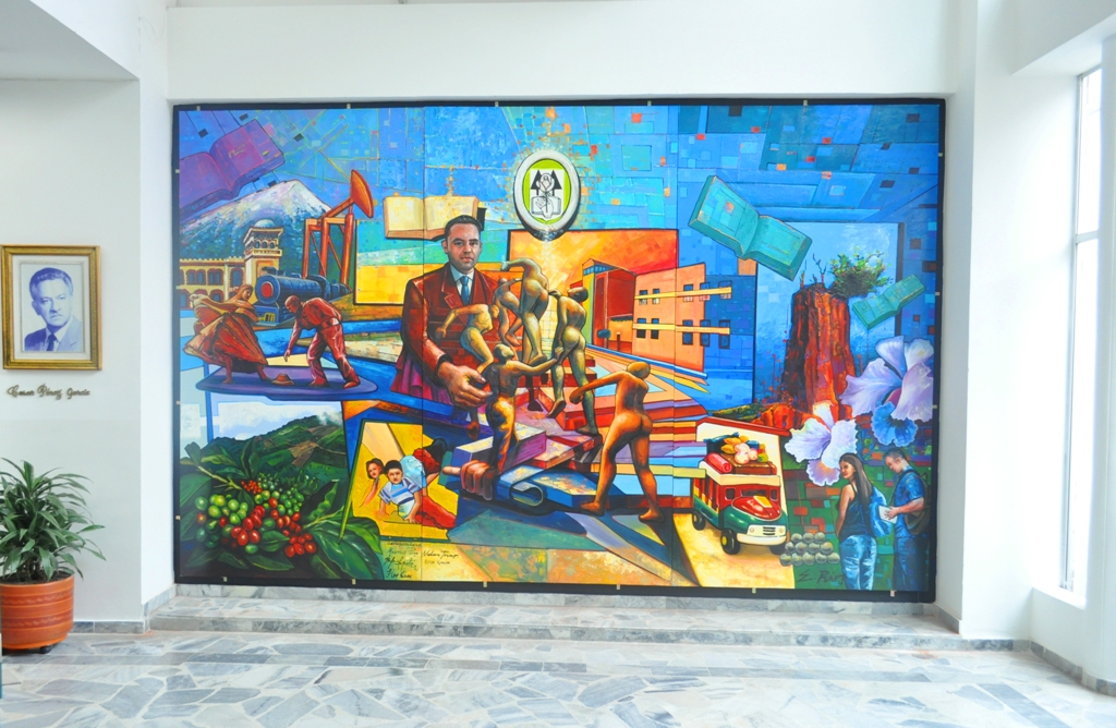 “Universidad de Talla Mundial", Biblioteca Universidad Cooperativa de Colombia sede Neiva Huila Colombia. Autor Ernesto Rios Rocha